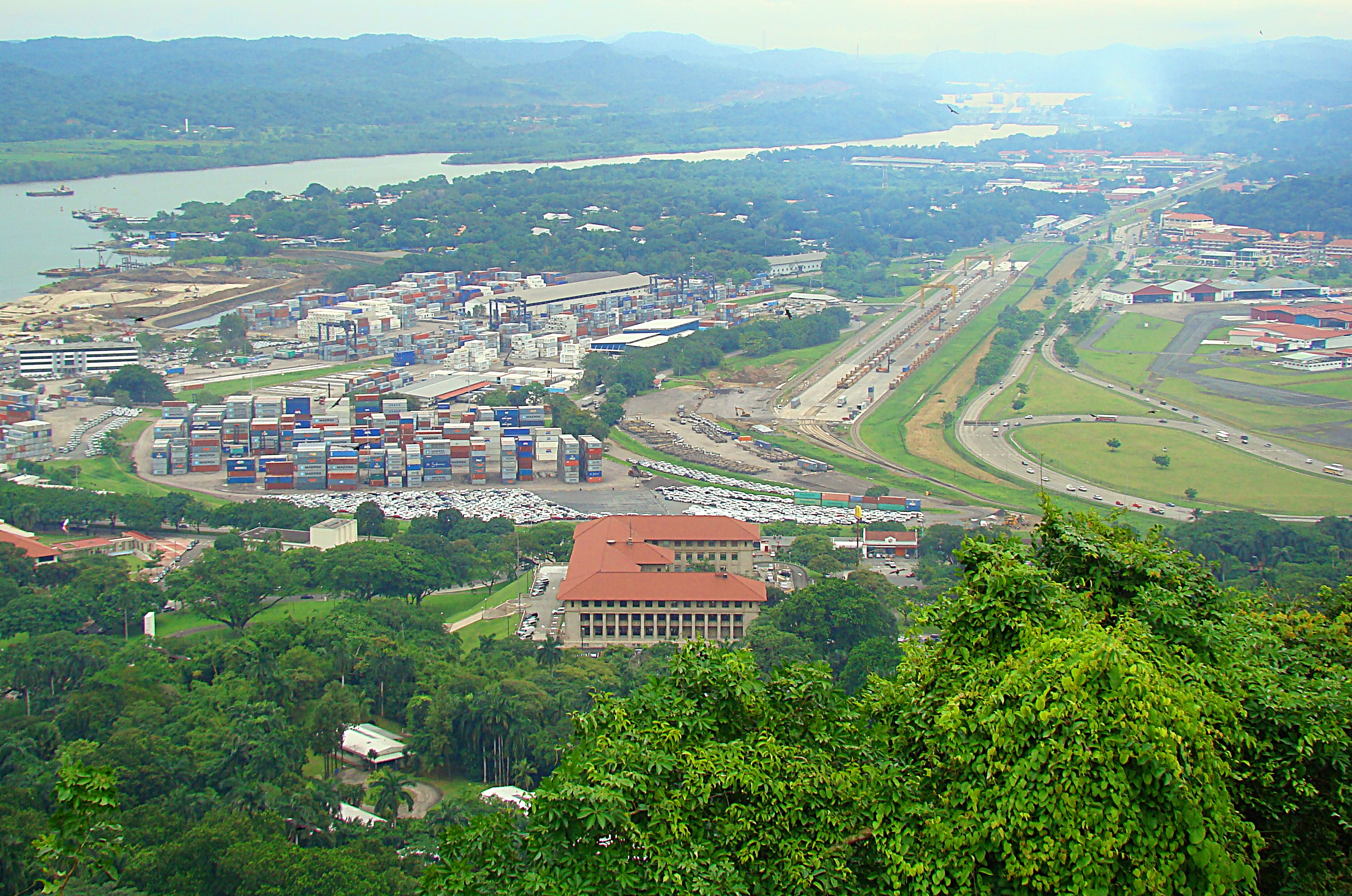 Edificio de la Administración visto desde el Cerro Ancón.